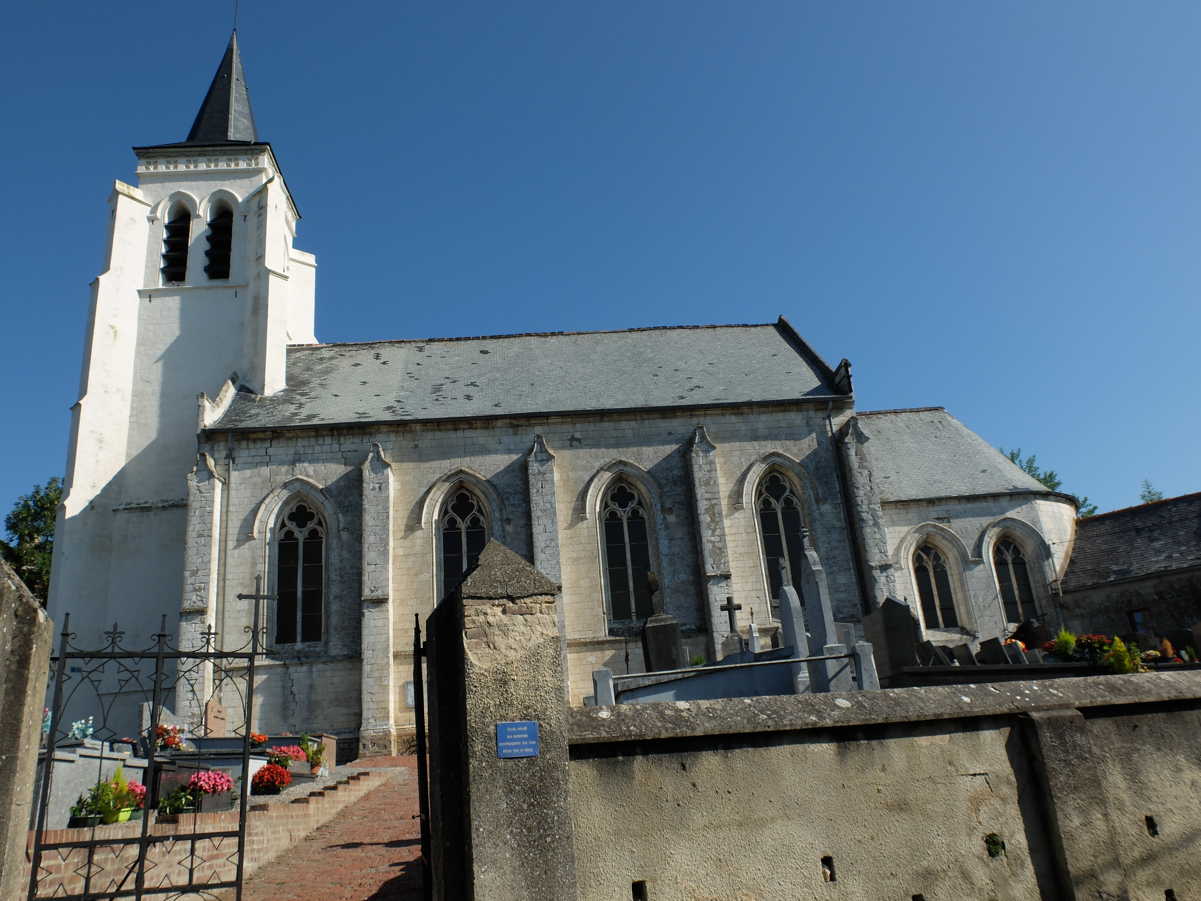 Vue de l'église Saint-Vaast de Contes (Pas-de-Calais).